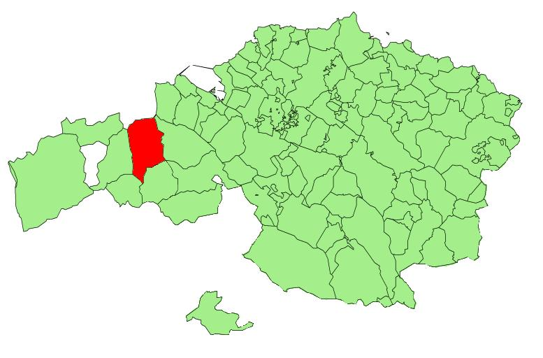 Situación de Sopuerta